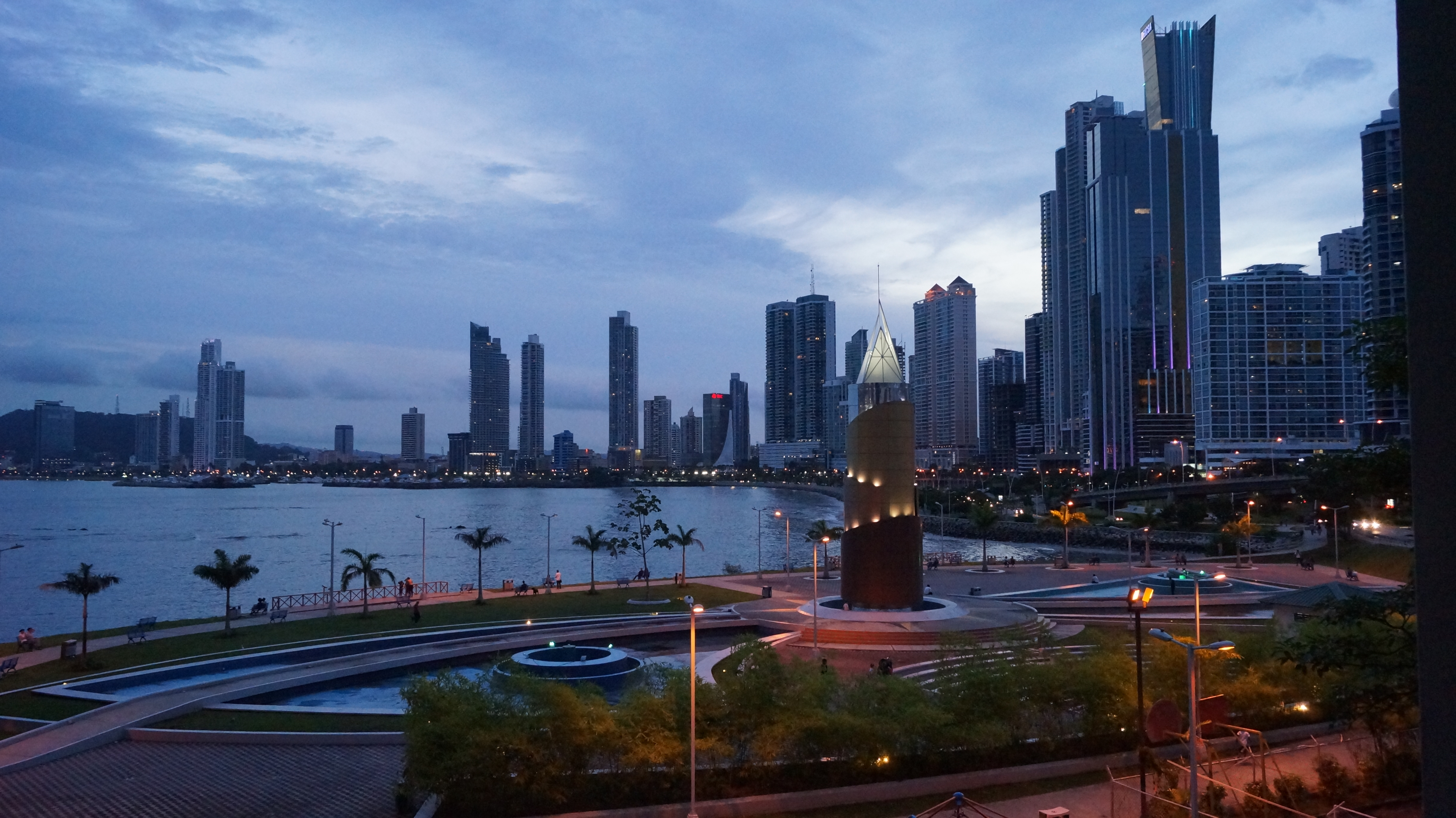 EL PARQUE MIRADOR PAITILLA QUE SE ENCUENTRA A UN COSTADO DE LA DESEMBOCADURA DEL RÍO MATASNILLO EN EL SECTOR DE PUNTA PAITILLA, CON UN DISEÑO CONCEPTUAL QUE PRESENTA UNA PLAZA TEMÁTICA, JUEGO DE LUCES, FUENTES, MIRADORES, COLUMNA CENTRAL, ANFITEATRO, ENTRE OTROS ATRACTIVOS SITIO DE ESPARCIMIENTO, MEDITACIÓN Y RECREACIÓN. LA COLUMNA SE SITÚA EN LA PARTE CENTRAL DE LA PLAZA REPRESENTANDO AL ISTMO DE PANAMÁ DE MANERA ESTILIZADA, MODERNA Y VANGUARDISTA. DOS MIRADORES, DONDE HAN SIDO COLOCADOS ALGUNOS BINOCULARES CON ALCANCE AL SECTOR DEL CAUSEWAY, EN AMADOR